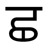 чхучха